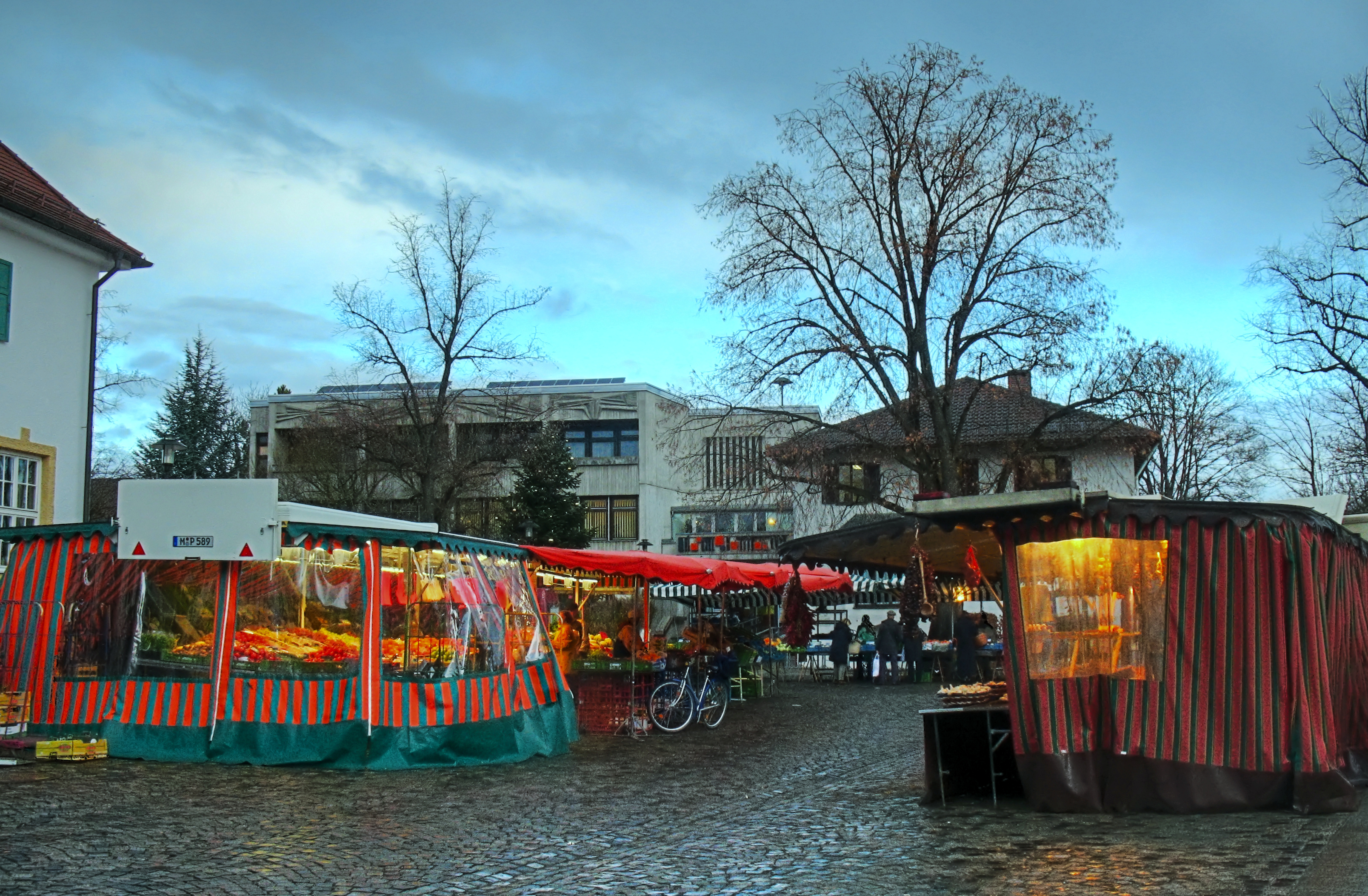 Deutschland, Bayern, Landkreis Fürstenfeldbruck, Gröbenzell, Wochenmarkt am Rathausplatz